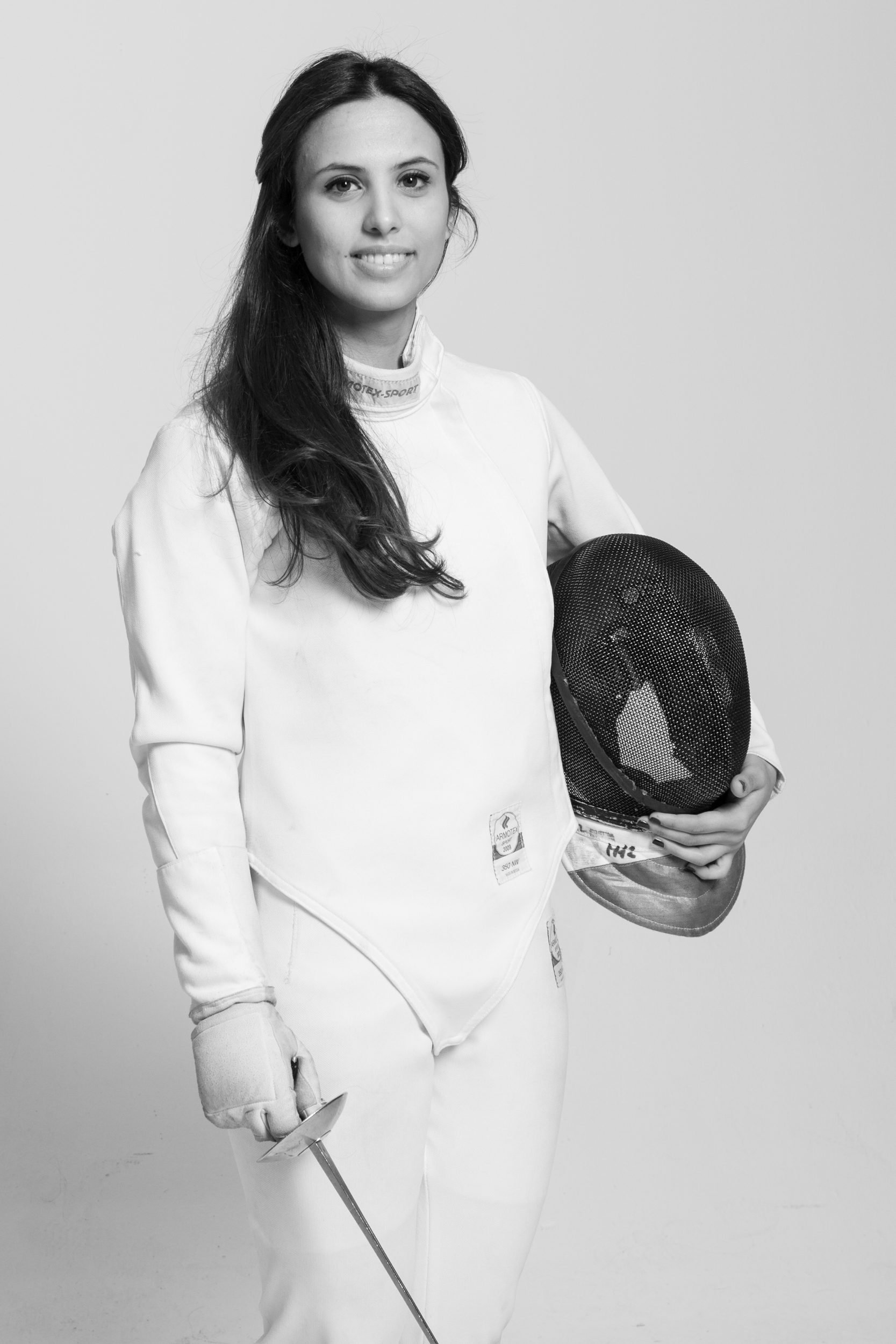 İrem Karamete